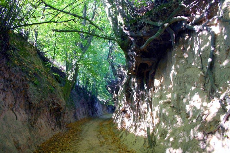 Kazimierz Dolny in Poland